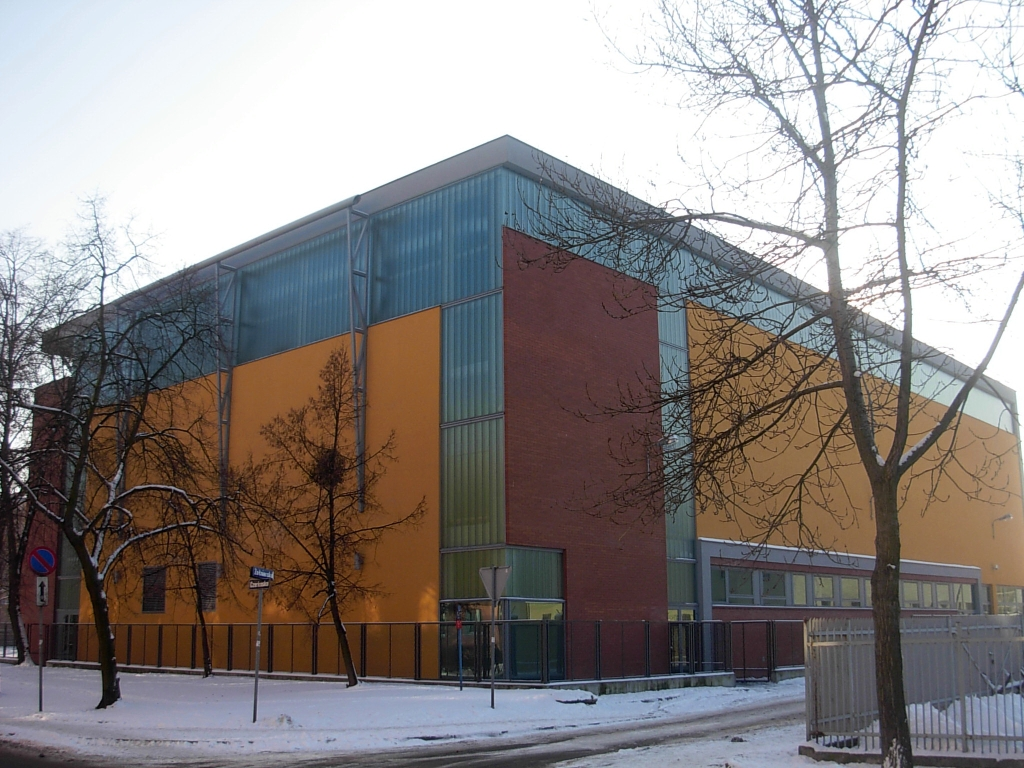 Sala gimnastyczna Szkoły Podstawowa nr 15 z Oddziałami Mistrzostwa Sportowego w Bydgoszczy im. Teresy Ciepły, ul. Czerkaska 8, 85-641 Bydgoszcz